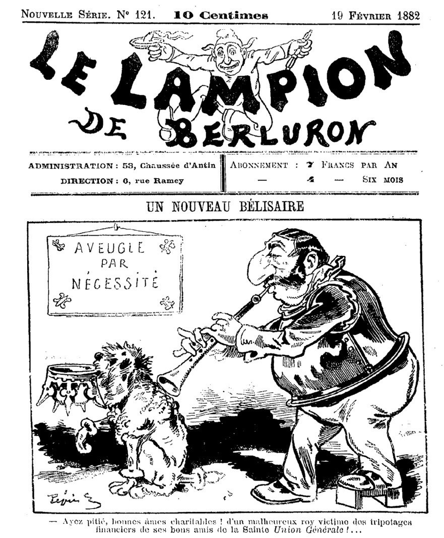 "Un nouveau Bélisaire. - Ayez pitié bonnes âmes charitables ! d'un malheureux roy victime des tripotages financiers de ses bons amis de la Sainte Union générale ! ..." A propos du krach de l'Union générale, banque soutenue par les milieux catholiques légitimistes et notamment par le comte de Chambord.